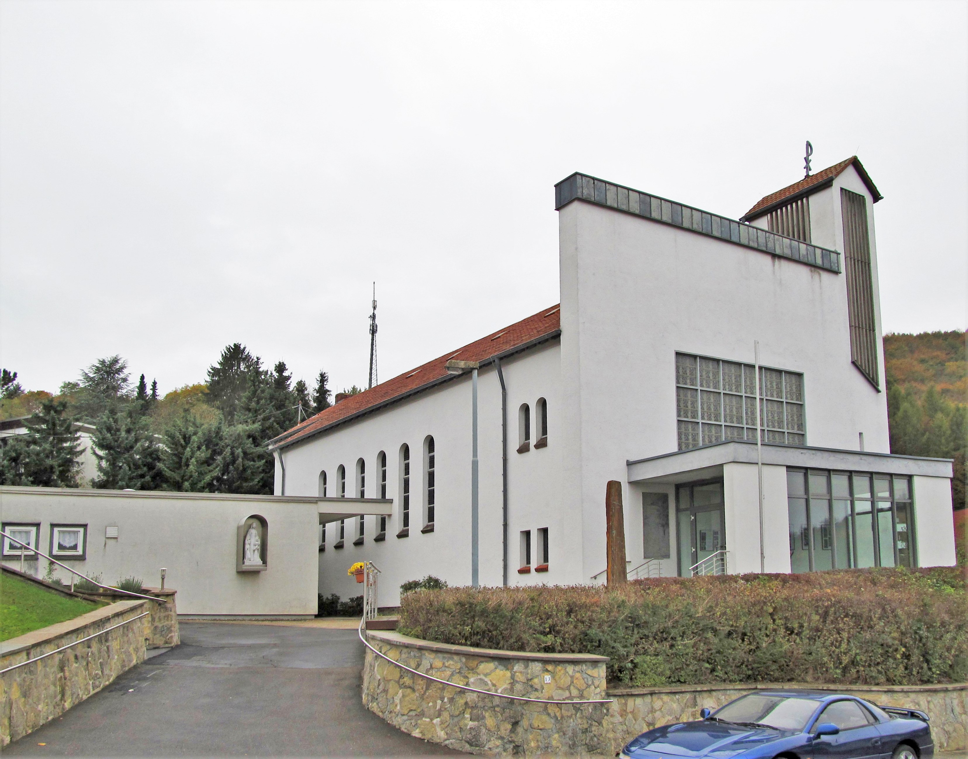 Die katholische Kirche St. Ursula in Scheidt, einem Stadtteil der saarländischen Landeshauptstadt Saarbrücken